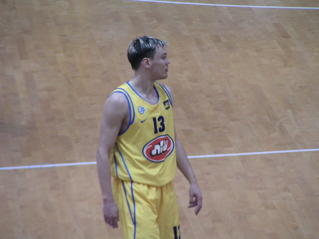 שאראס